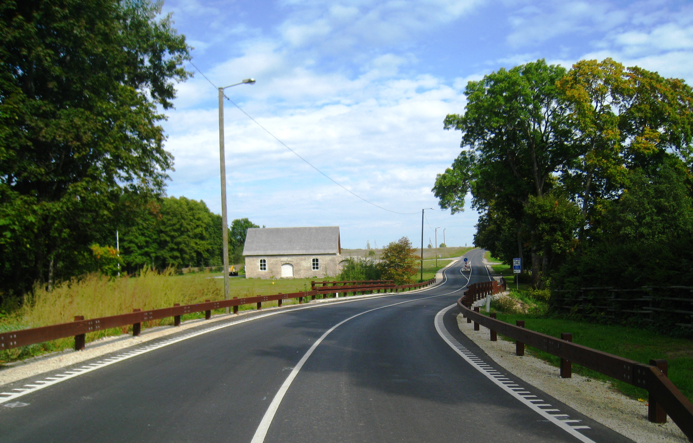 Kuusalu-Leesi tee läbib Soorinna küla